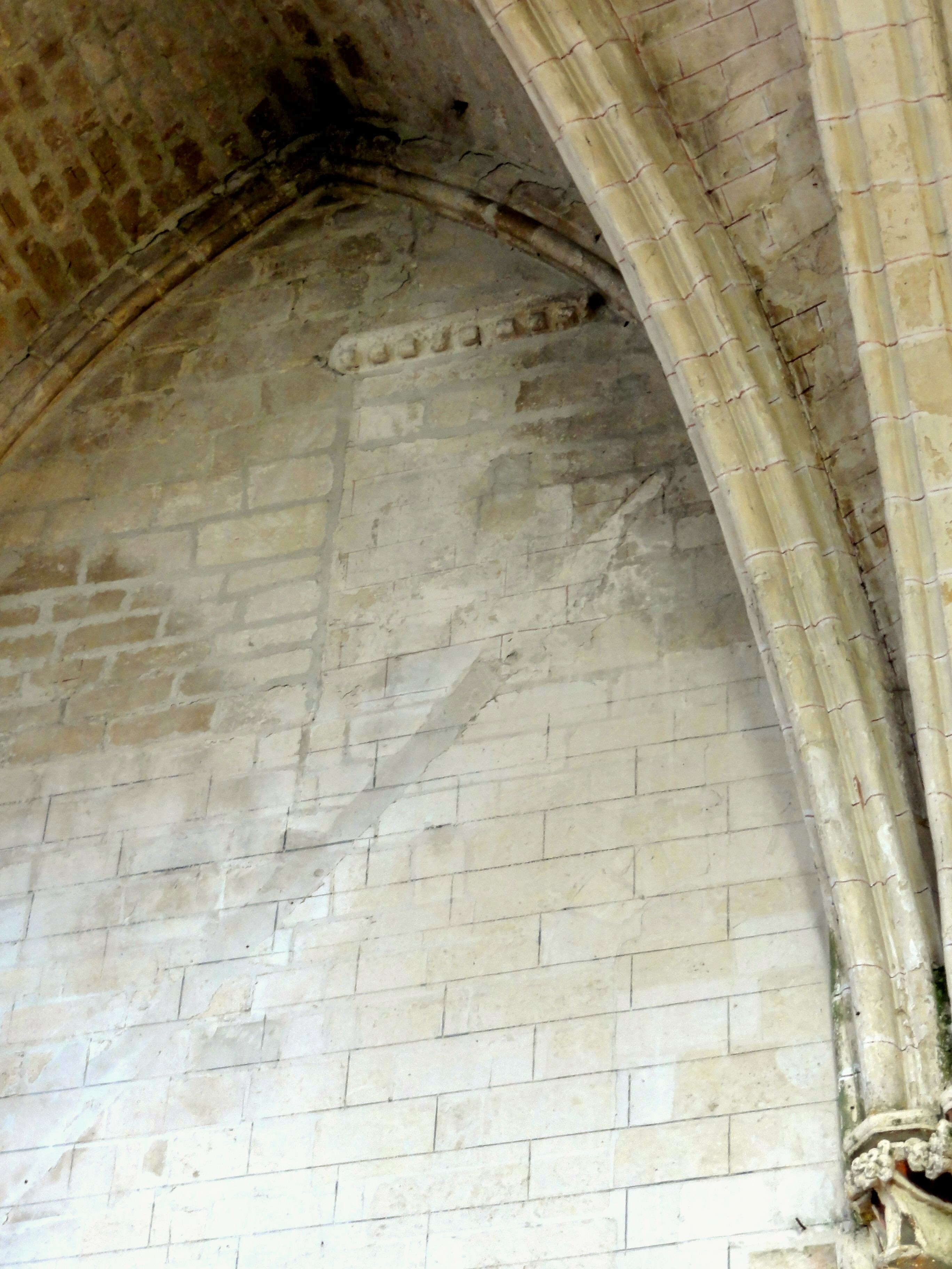 Baie bouchée dans la base du clocher, côté est.